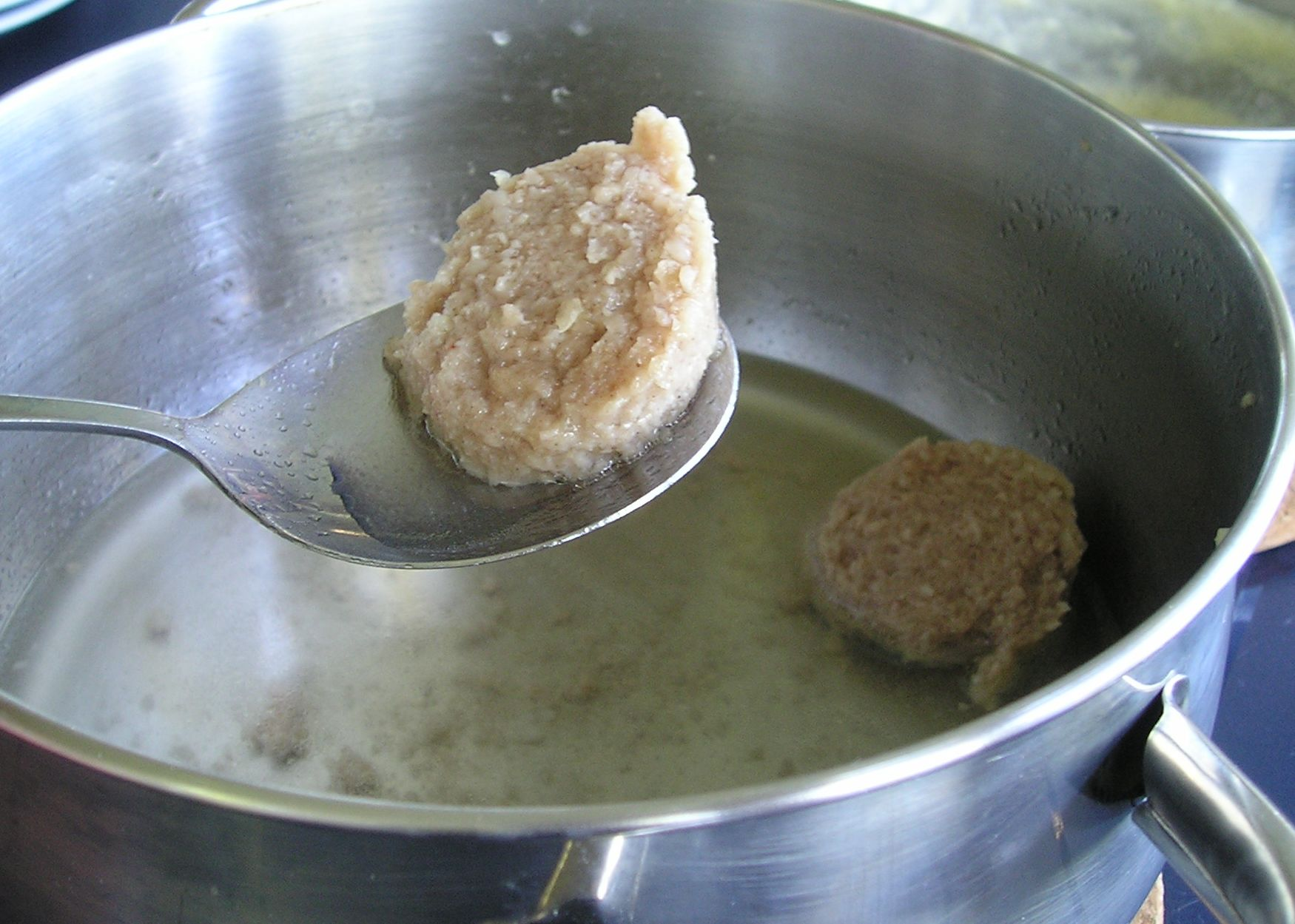 En bit värmlandskorv på väg upp ur en gryta, fotograferad i